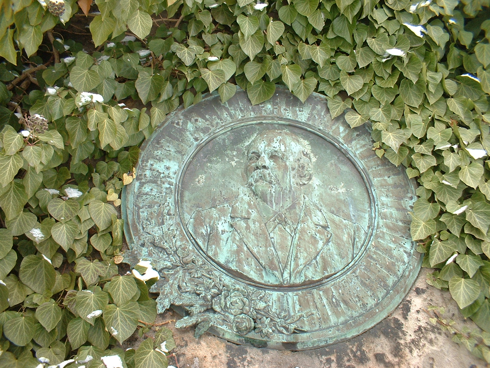 Denkmal für den Architekten Sommerschuh in Rippien